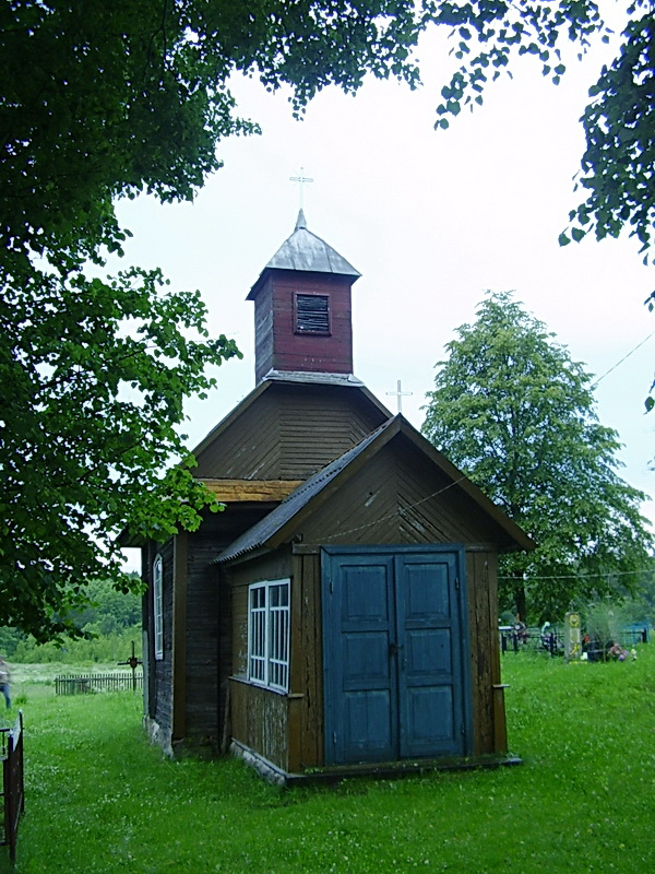 Атцэда. Каталіцкая капліца Святога Роха